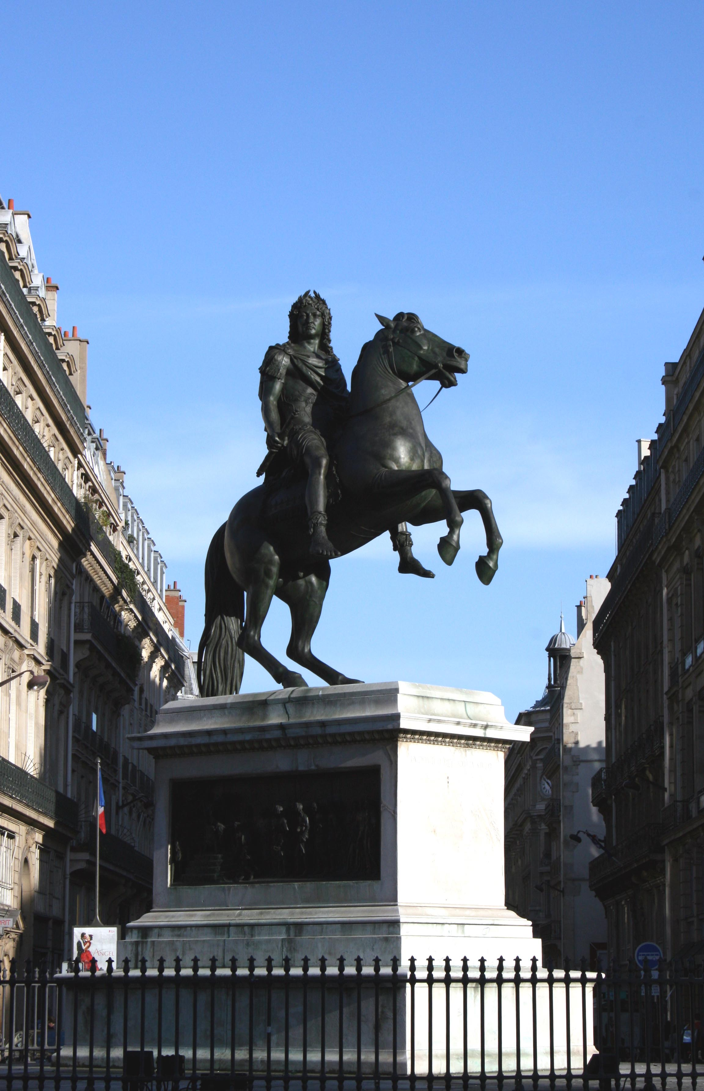 Statue équestre de Louis XIV, par François-Joseph Bosio, 1822. Place des Victoires à Paris.